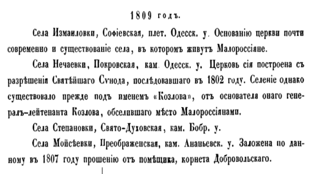 VSergo2